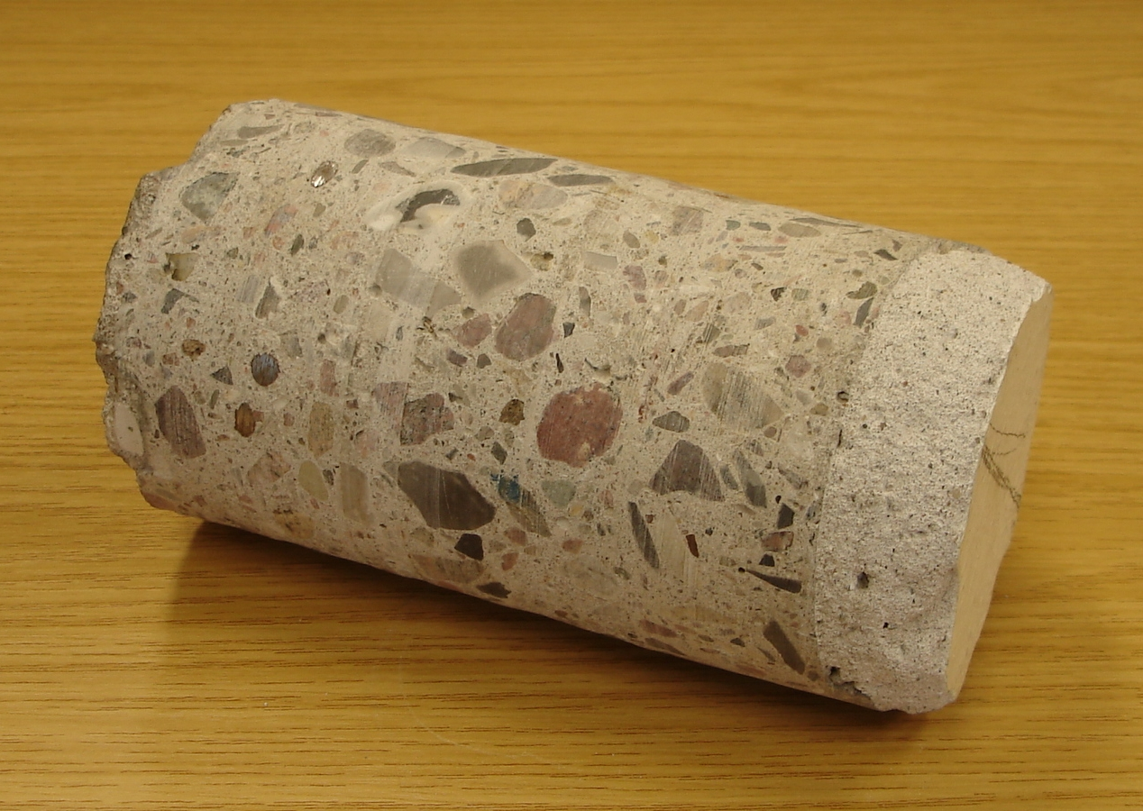 Bild eines Hohlbohrkernes. Hohlkernbohrer arbeiten sehr genau. Auf der rechten Stirnfläche ist die Markierung auf der Wandfarbe zu sehen, dort sollte gebohrt werden. Danach folgt die Putzschicht (im Bild: 2,6 cm) und eine Stahlbetonwand. Der Betonzuschlag wurde sauber ausgebohrt. Im linken Viertel des Bildes sind zwei Stahlbewehrungen zu erkennen: Der weisse Fleck ist eine Reflexion eines schräg durchtrennten Stahlstabes, der etwas darunter liegende blaue Kreis besteht ebenfalls aus Stahl. Trotz der mechanischen Gewalt, die für diesen Bohrkern ausgeführt werden musste, ist der Kern völlig unbeschädigt.